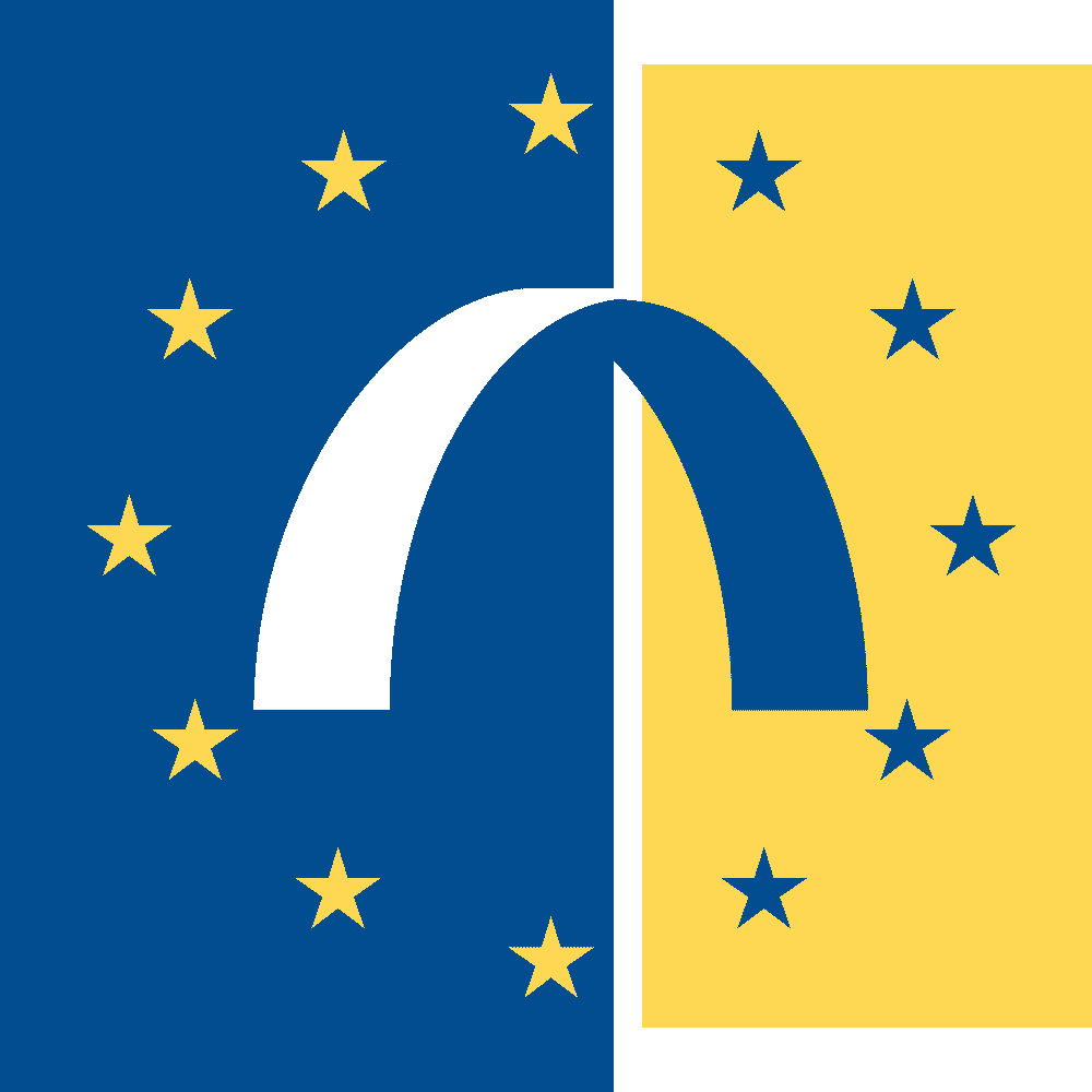 Logo der Europäischen Beobachtungsstelle für Drogen und Drogensucht (EMCDDA)